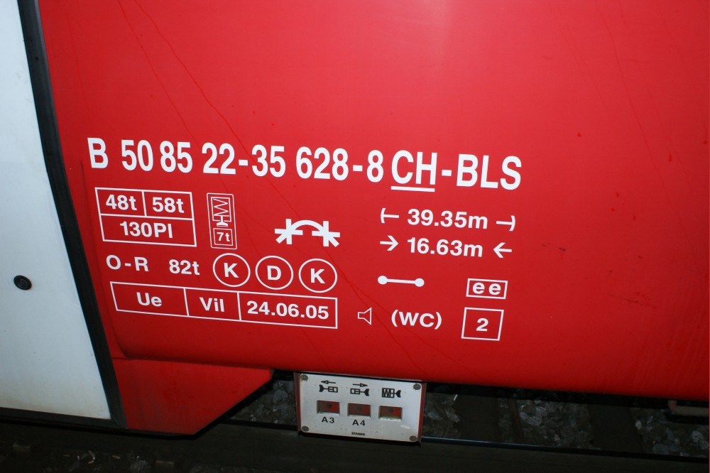 Anschriftenfeld des B 50 85 22-35 628-8 CH-BLS (Jumbo) ex RM 50 38 22-33 522-3 nach Einbau der Klimaanlage